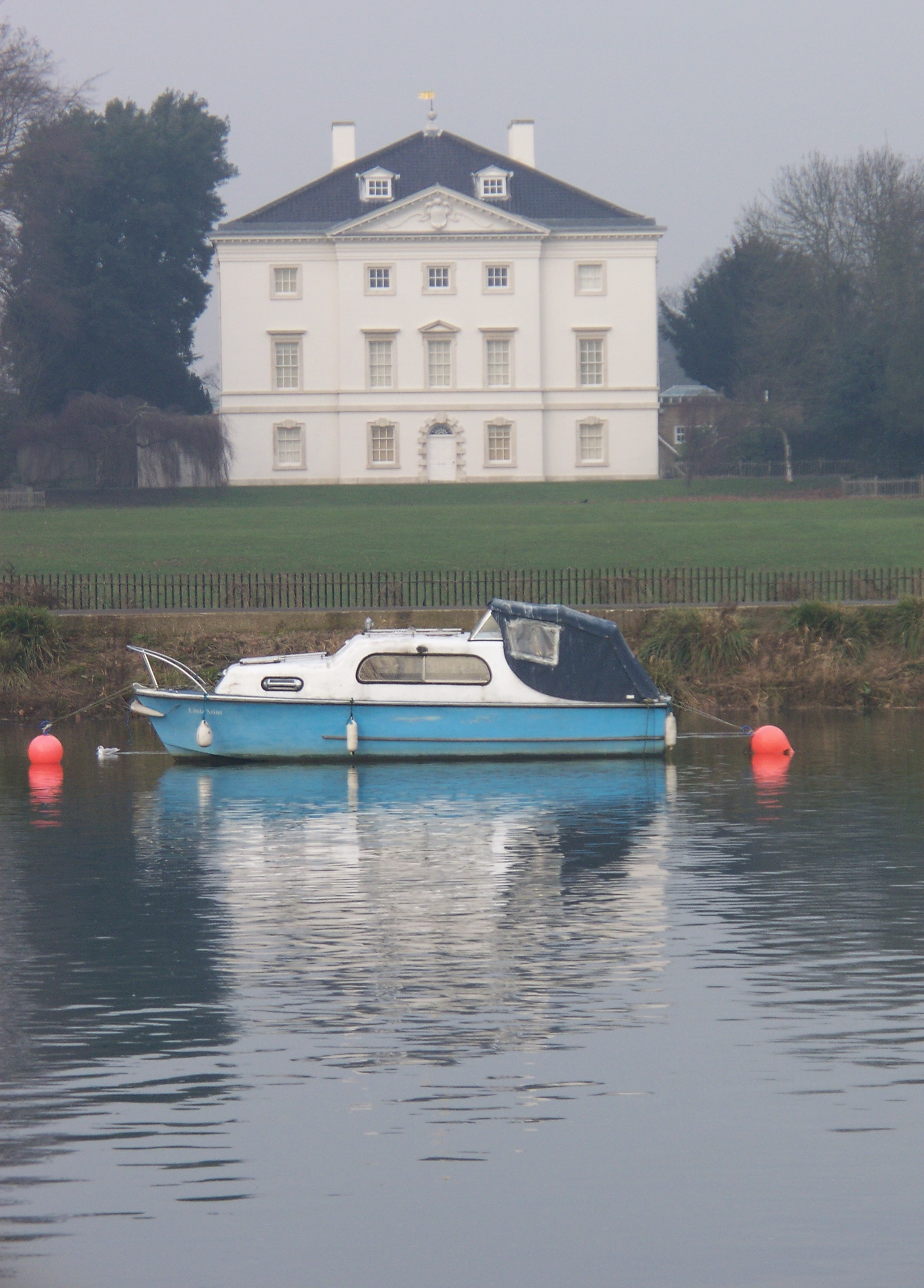 Marble Hill House, Twickenham